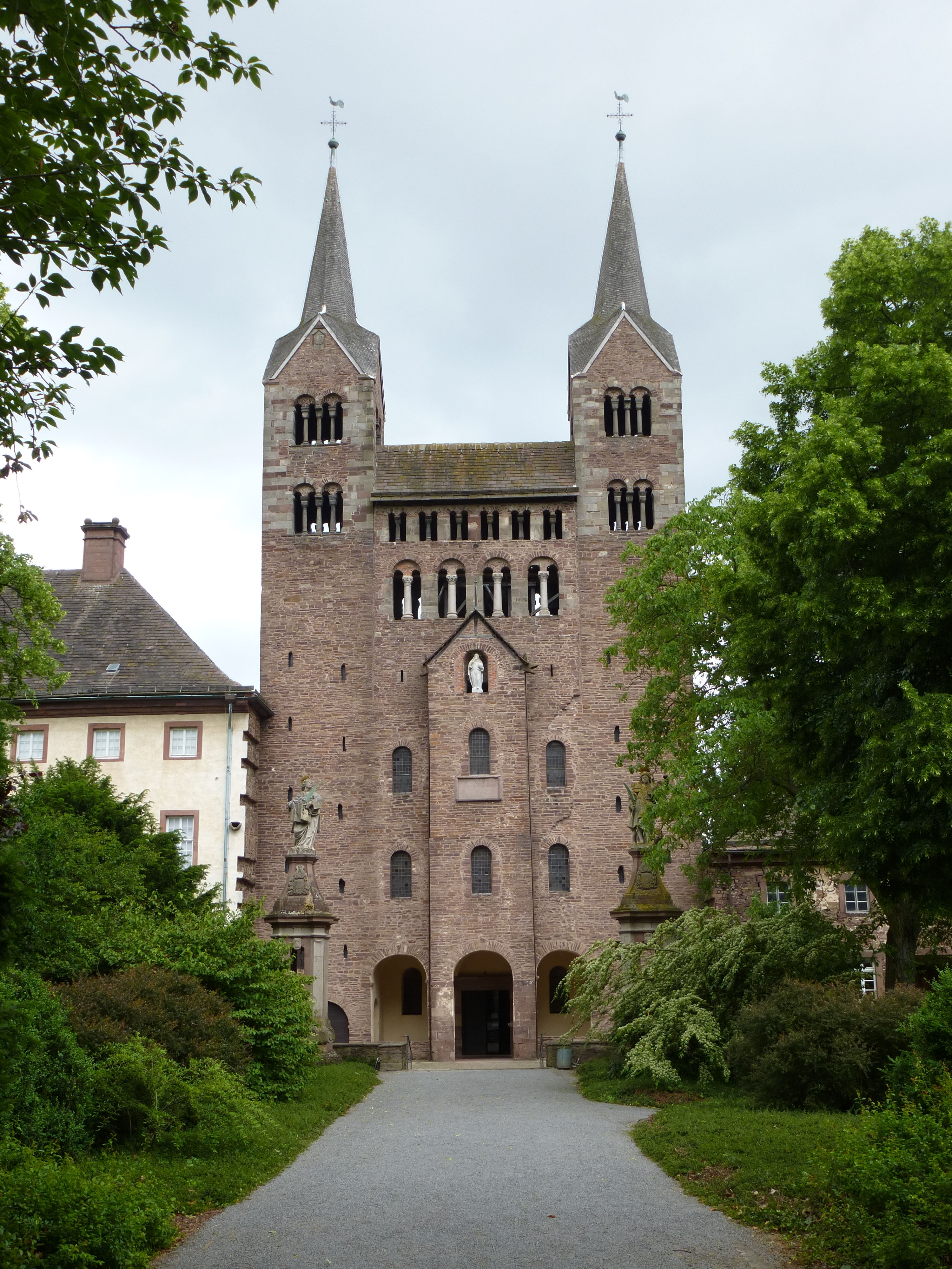 Das Westwerk der Klosterkirche Corvey 2013